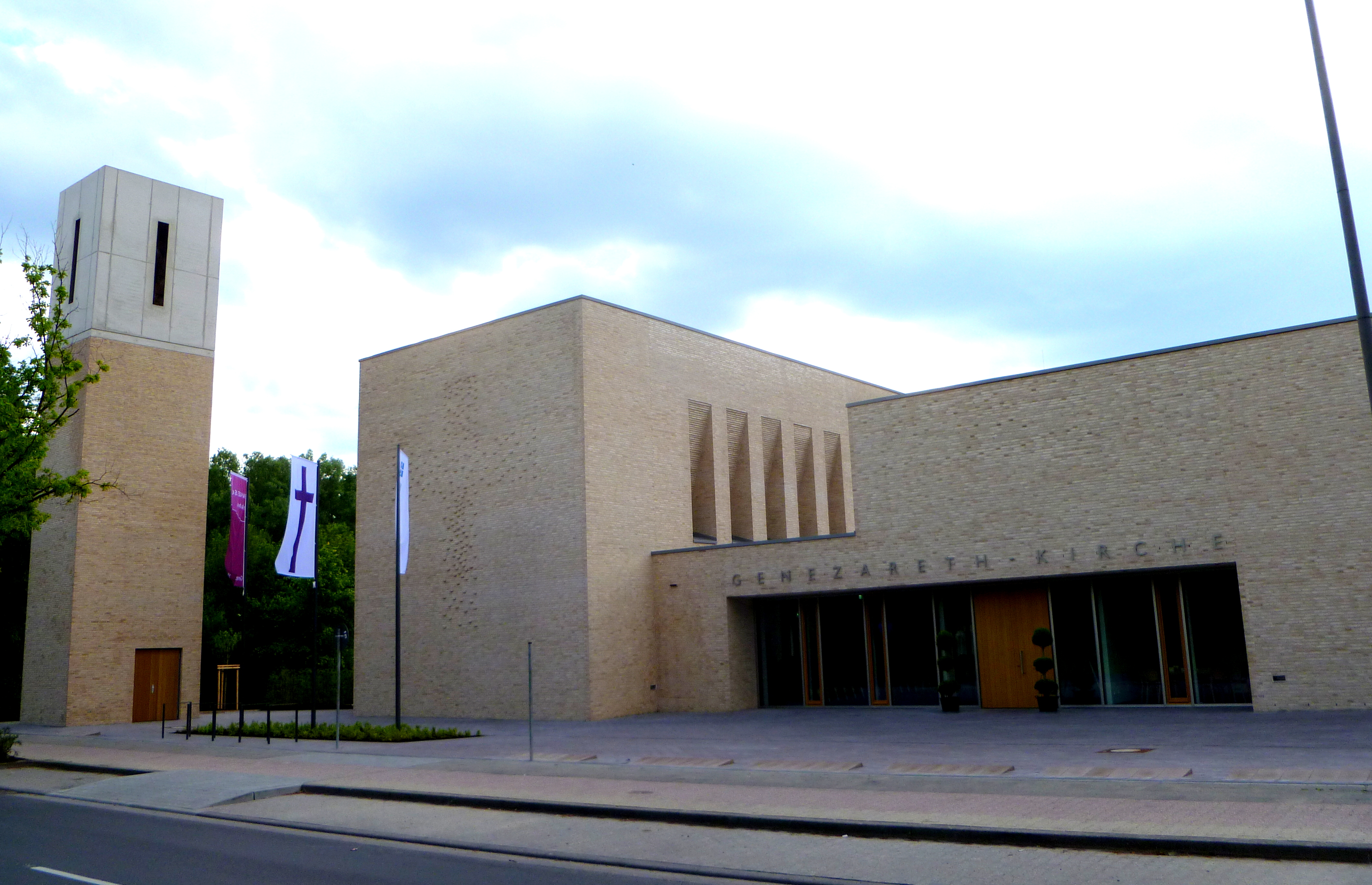 Neue evangelische Genezareth-Kirche in Aachen, eingeweiht Mai 2018, Architektin: Gesine Weinmiller